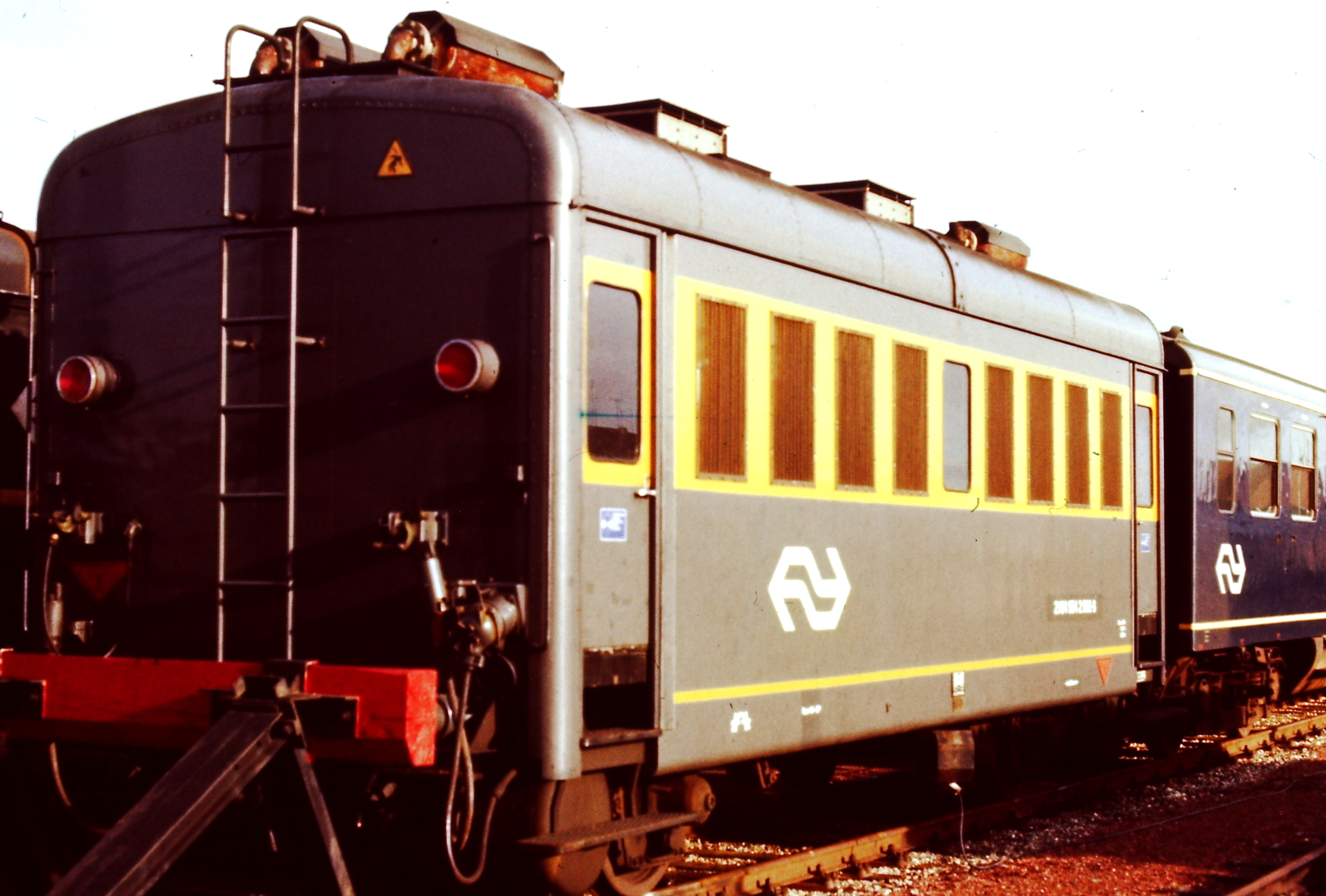 NS energiewagen. Voor gebruik in de winter werden in 1970-1971 door de Franse firma Soulé zeven energiewagens op onderstellen van goederenwagens gebouwd. De energiewagens waren voorzien van twee luchtgekoelde dieselmotoren. De energiewagens waren genummerd: 21 84 9542 506-6. [1]